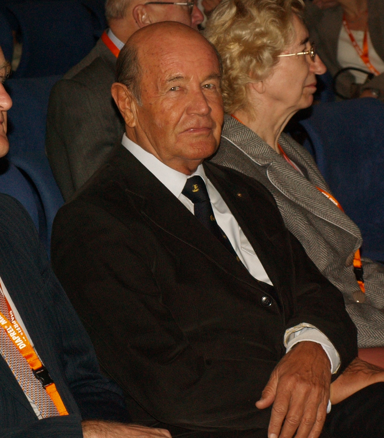 Czech diabetologist prof. Jaroslav Rybka in the time of Annual conference of Czech diabetology society in Luhacovice inside the sale of conference.